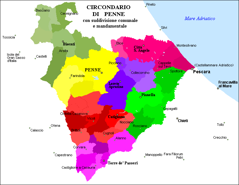 Circondario di Penne - suddivisione comunale e mandamentale